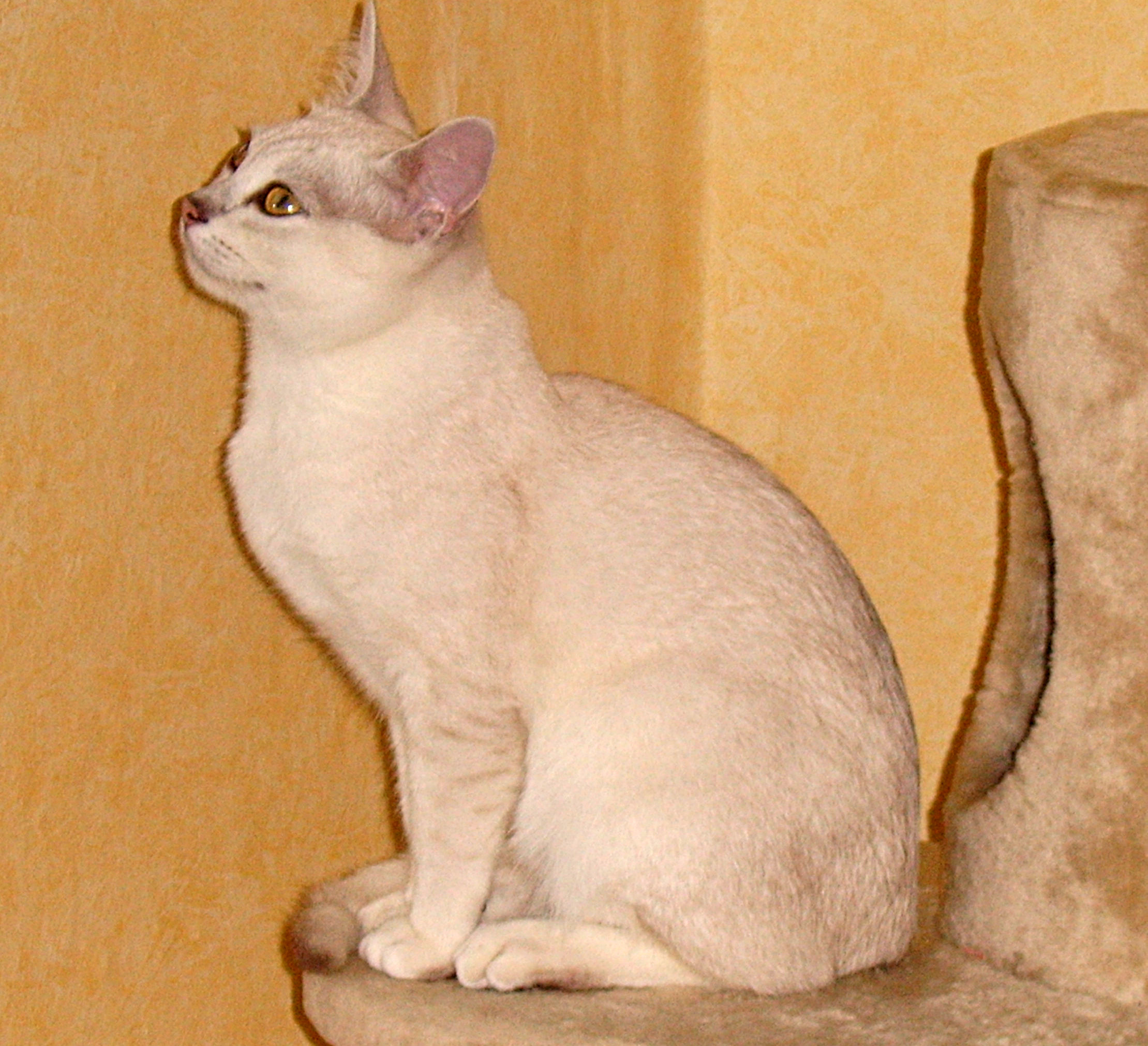 Eigener Burmilla-Kater. Der Name ist Andy of Chattahoochee.